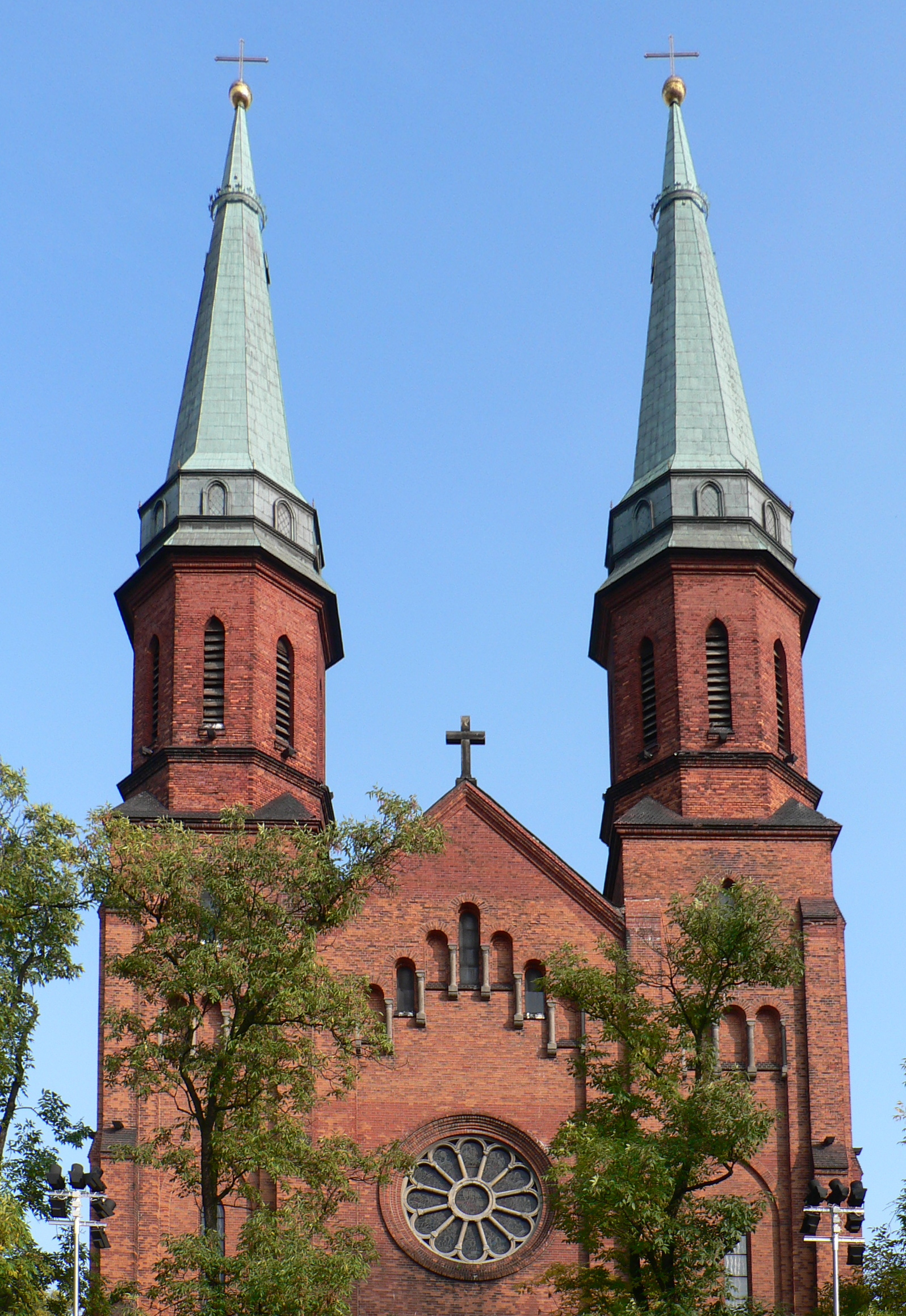 Kościół pw. św. Kazimierza w Pruszkowie